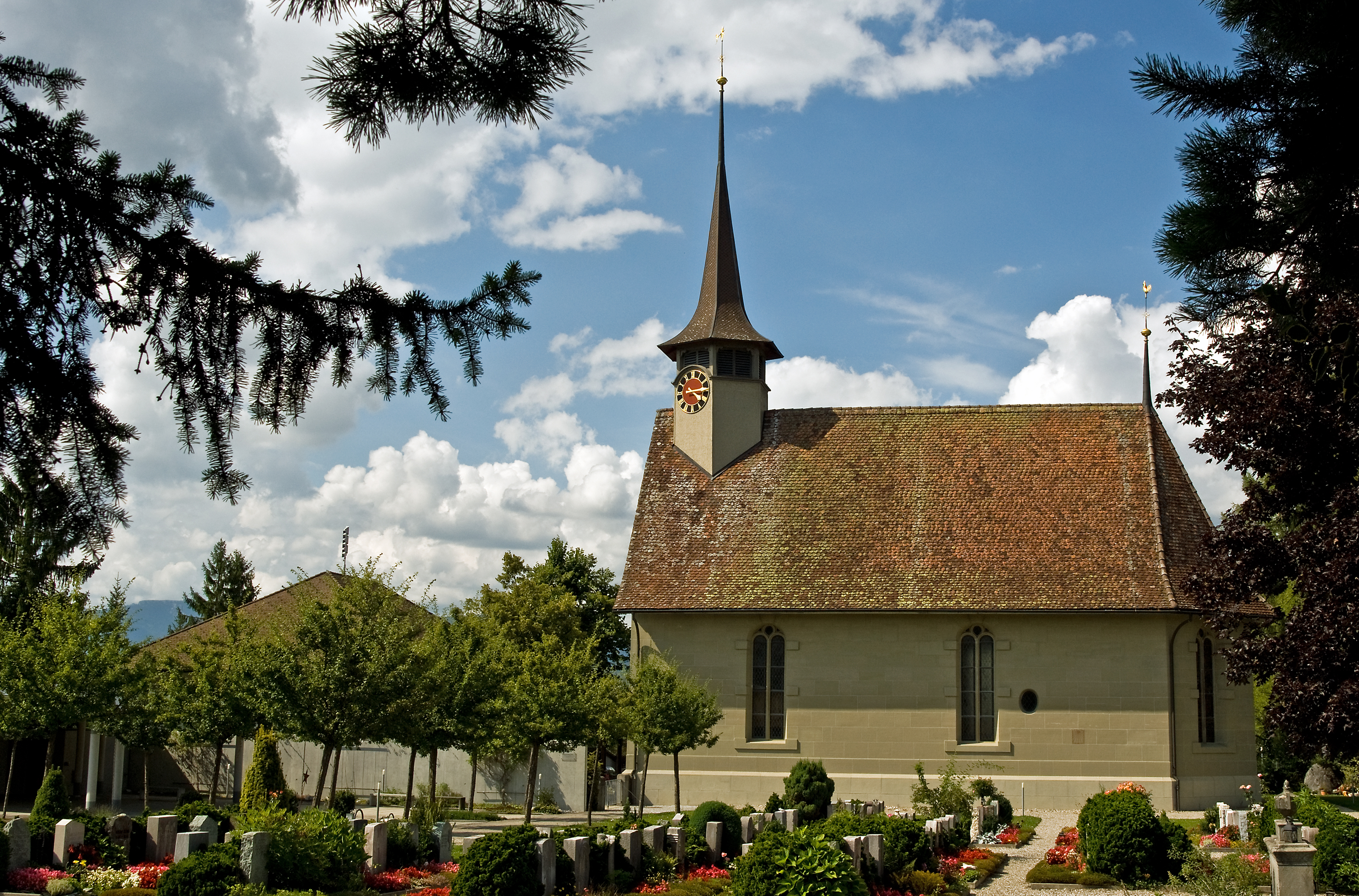 Reformierte Kirche Bätterkinden, Friedhof